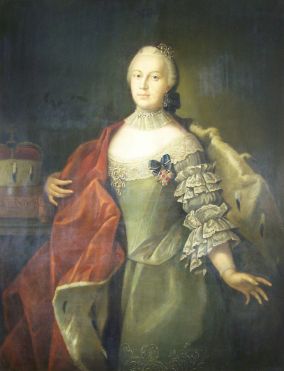 Das Ölbild zeigt die Herzogin Christiane Charlotte von Sachsen - Hildburghausen, geb. Prinz. von Brandenburg - Culmbach (1733 - 1757), 2. Gemahlin von Herzog Ernst Friedrich III. Carl. Sie trägt ein graues Kleid und über rechten Schulter den Hermelinmantel. Sie trägt den dänischen "Orden zur perfekten Union - Ordne de I`union parfaite". Sie ist stehend dargestellt und links neben ihr steht ein Konsoltisch mit dem Herzogshut.